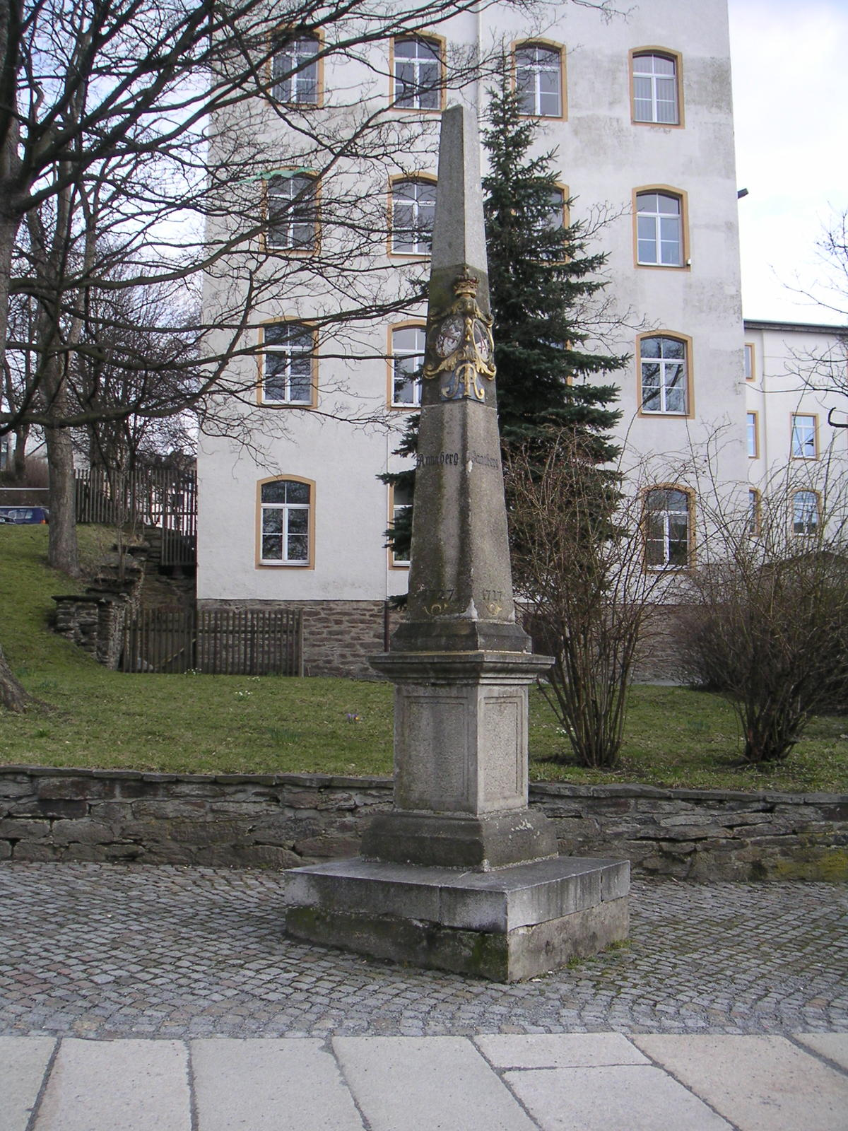 kursächsische Postmeilensäule von 1727 in Annaberg, beim ehemaligen Wolkensteiner Tor